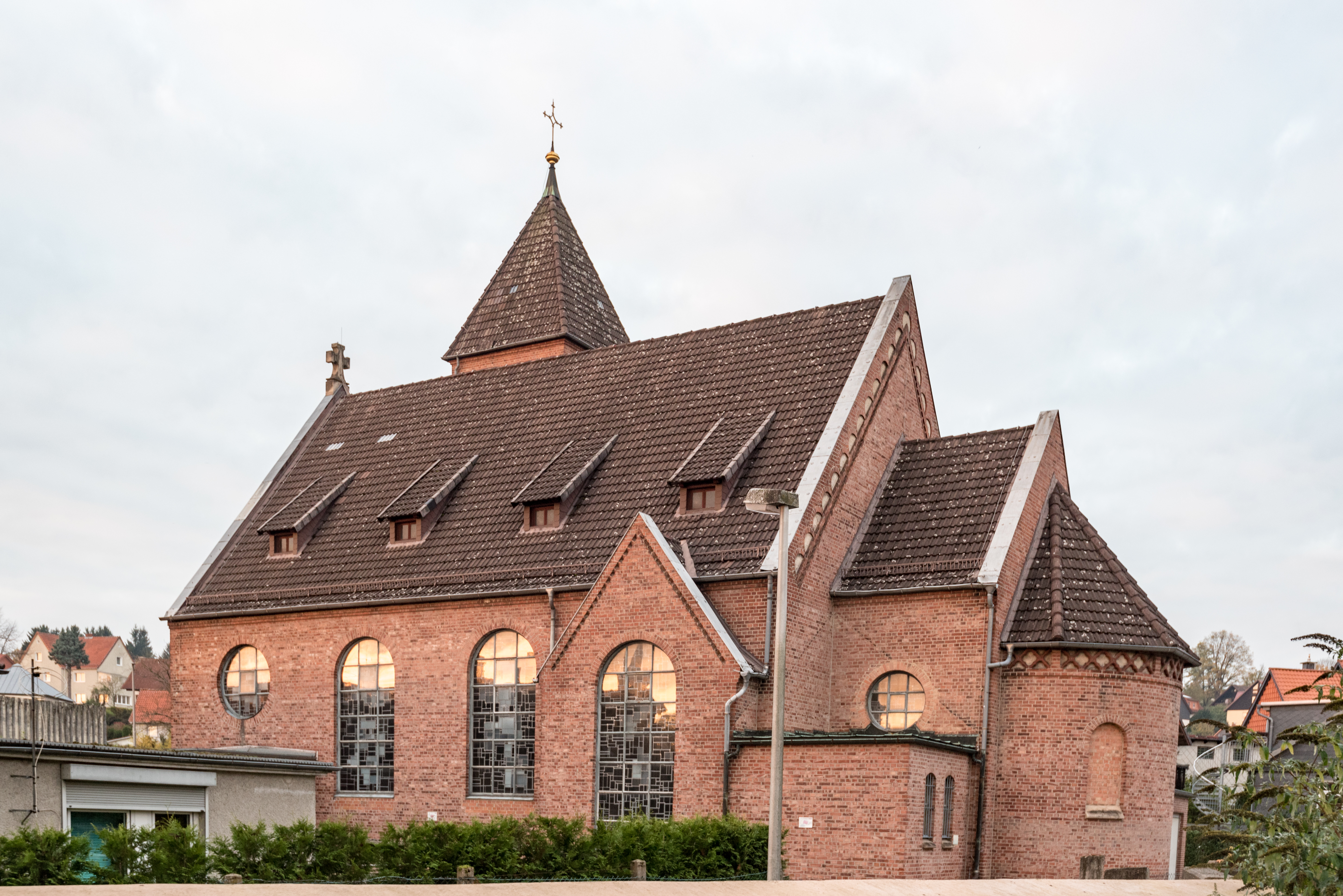 Osterode am Harz, Johannisvorstadt 25